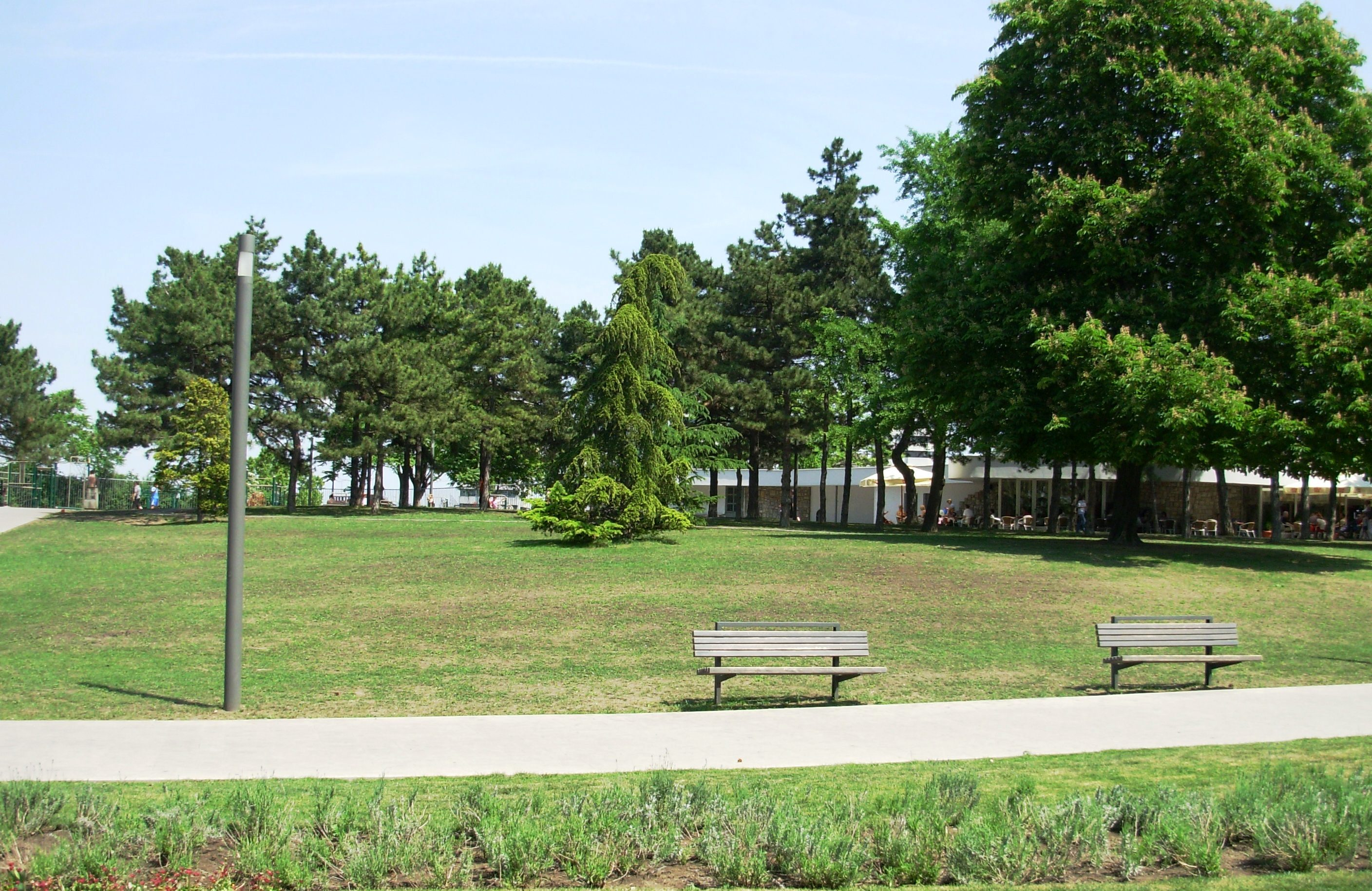 Brdašce, „Čupina umka (?)“, najviši deo Tašmajdana, kod restorana „Šansa“, Beograd, gde su najverovatnije spaljene mošti Svetog Save. Slikao Goldfinger